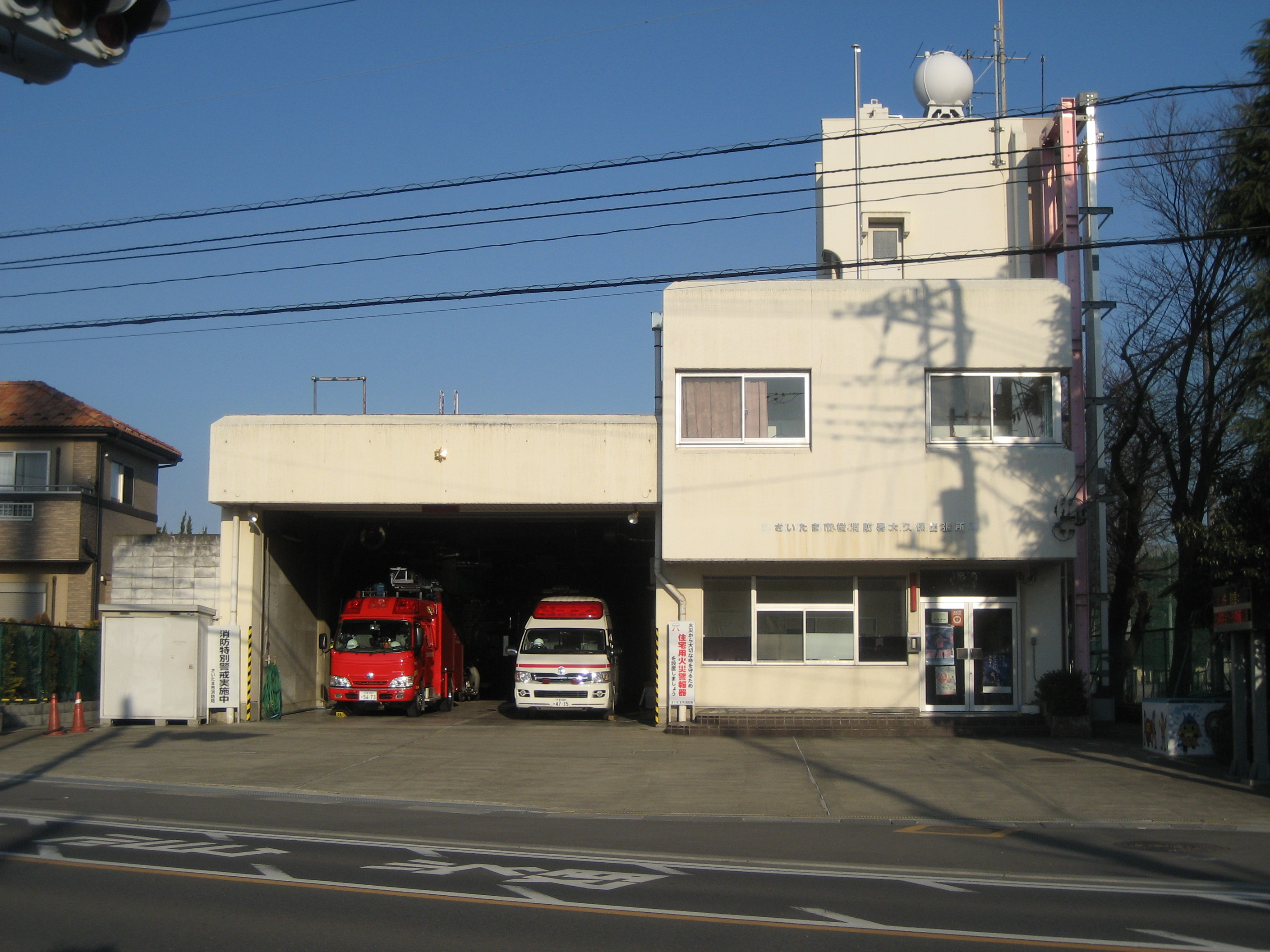 さいたま市消防局桜消防署大久保出張所